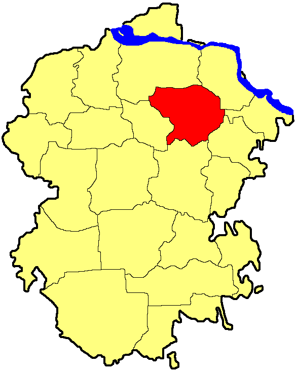 Цивільський район Чувашії